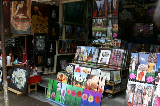 Market_of_Bangkok(짝뚜짝 시장)